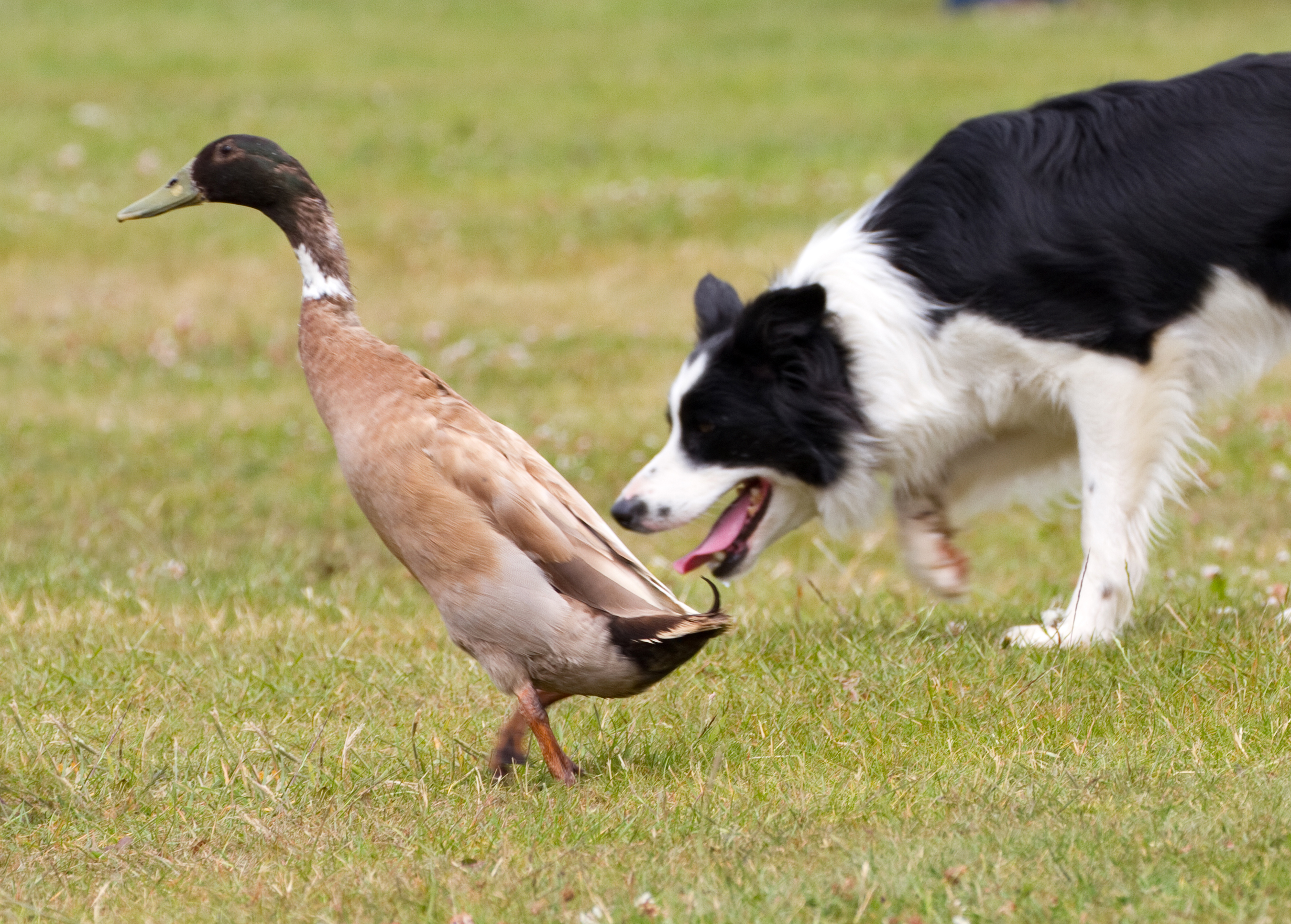 Duck herding dog